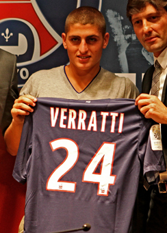 Marco Verratti s'est engagé au PSG pour les cinq prochaines saisons